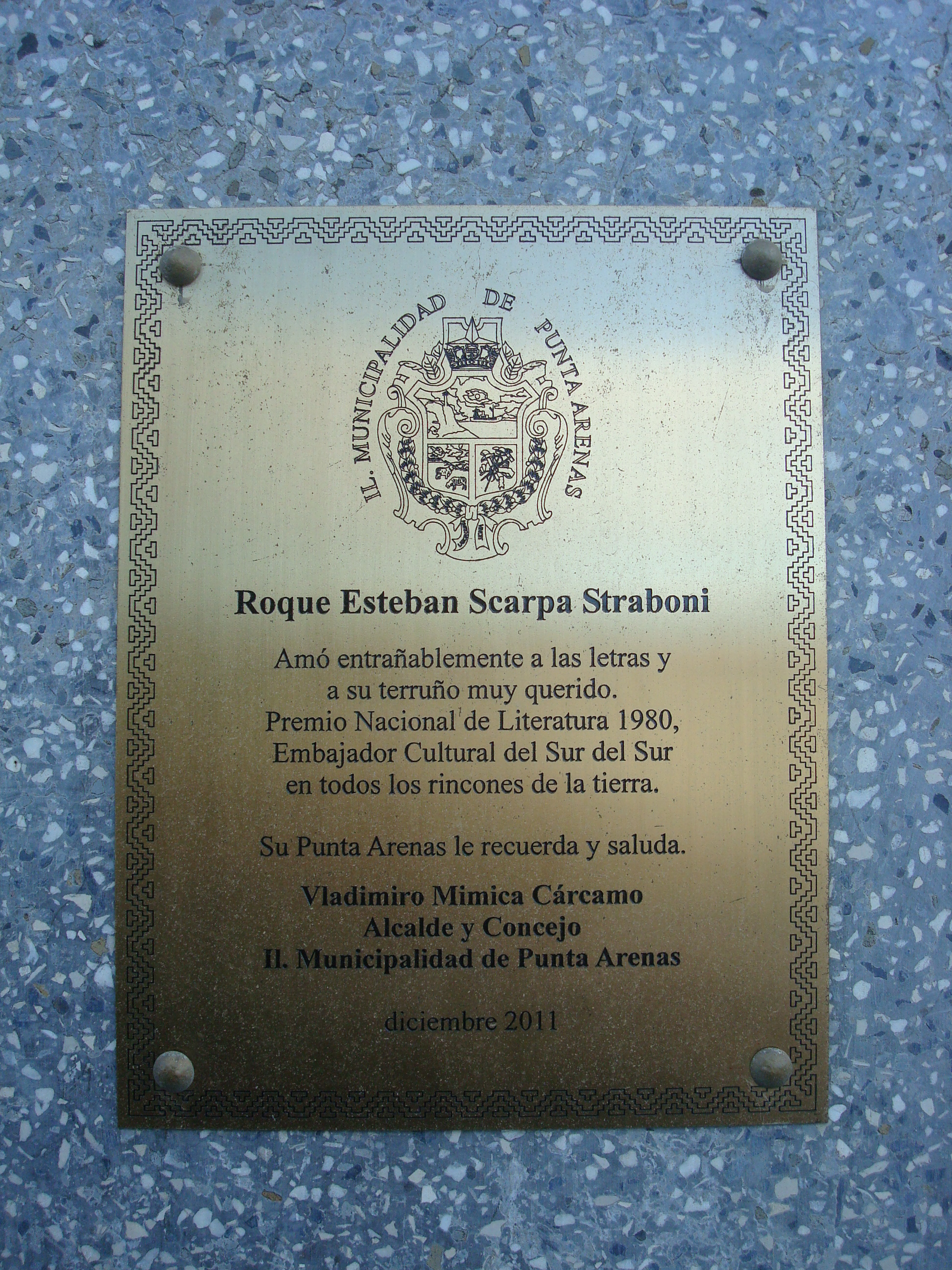 Placa en el mausoleo de la familia Scarpa Straboni, donde está la tumba de Roque Esteban Scarpa Straboni, Premio Nacional de Literatura de Chile de 1980. Cementerio Municipal de Punta Arenas Punta Arenas, Chile Agosto de 2012